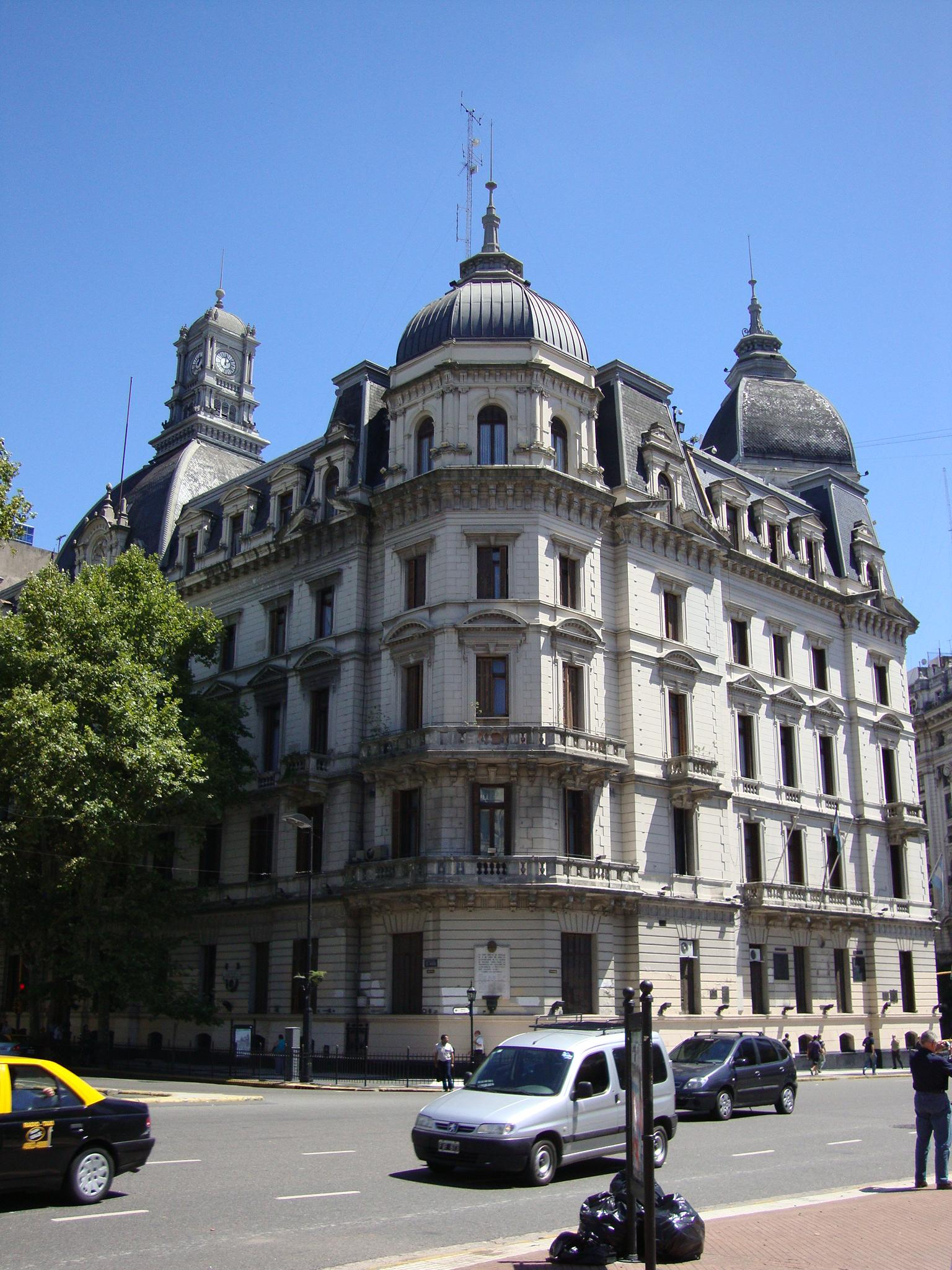 Edificio sede de la Jefatura de Gobierno de la Ciudad de Buenos Aires, construido entre 1891 y 1914, en etapas. Calle Bolívar entre Rivadavia y Avenida de Mayo.